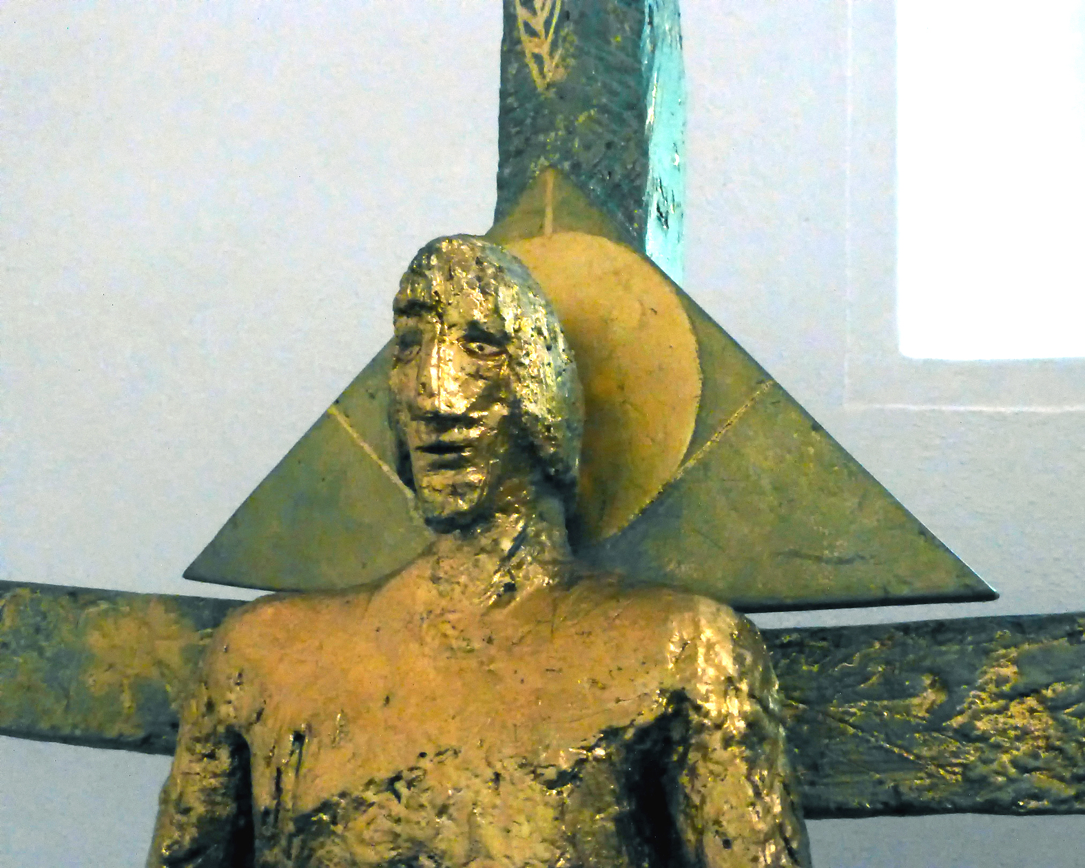 Detailansicht des Kopf- und Schulterbereichs